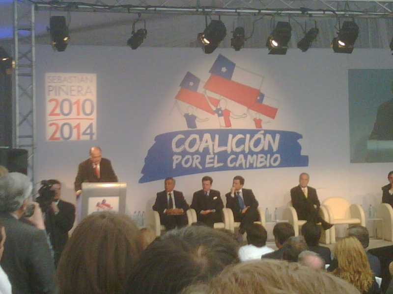 Presentación de la Coalición por el Cambio. Habla Fernando Flores.